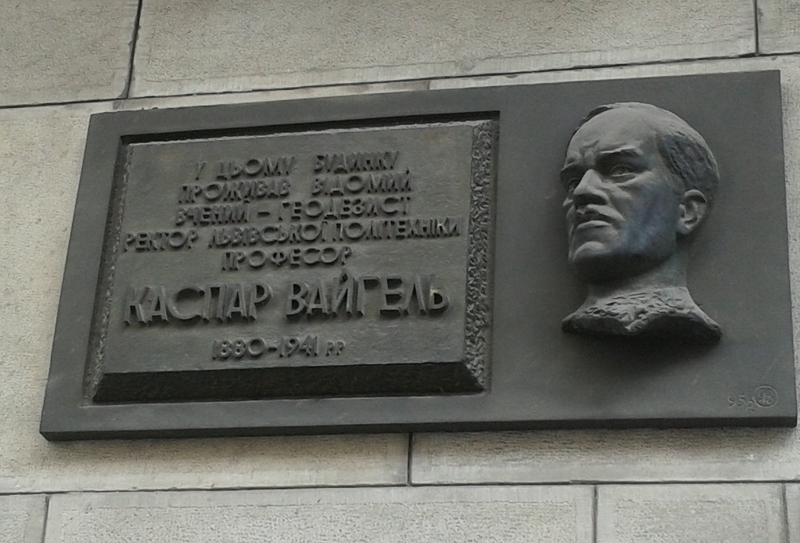 Мемориальная доска. Каспар Вейгель (1880 — 1941) — польский учёный-геодезист